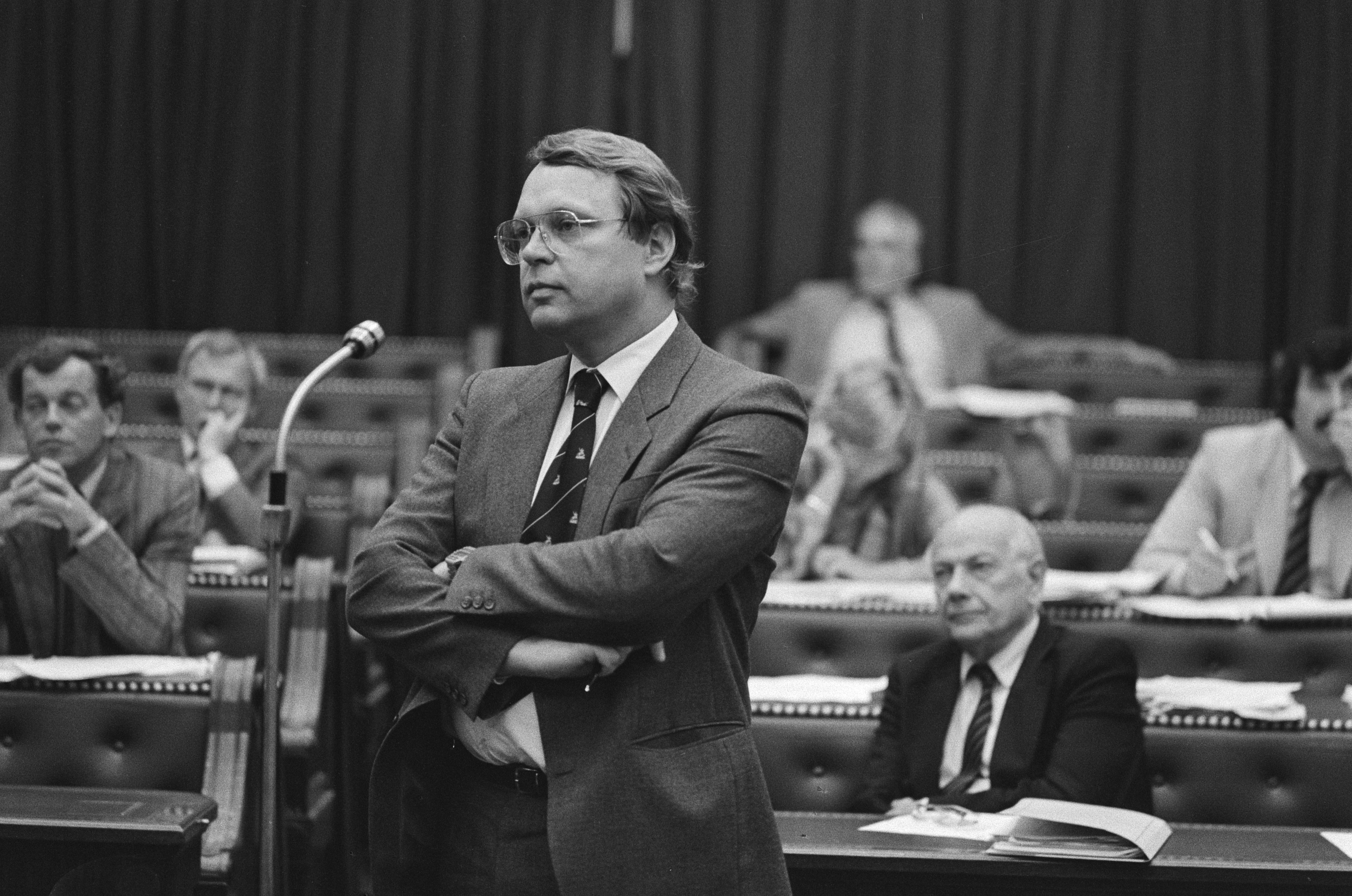 Collectie / Archief : Fotocollectie Anefo Reportage / Serie : [ onbekend ] Beschrijving : Tweede Kamer , debat plaatsingsverdrag kruisraketten met VS; Klaas de Vries (PvdA) aan de interruptiemicrofoon Datum : 22 oktober 1985 Trefwoorden : Debatten, KRUISRAKETTEN Persoonsnaam : Klaas De Vries Instellingsnaam : PvdA, Tweede Kamer Fotograaf : Bogaerts, Rob / Anefo Auteursrechthebbende : Nationaal Archief Materiaalsoort : Negatief (zwart/wit) Nummer archiefinventaris : bekijk toegang 2.24.01.05 Bestanddeelnummer : 933-4610